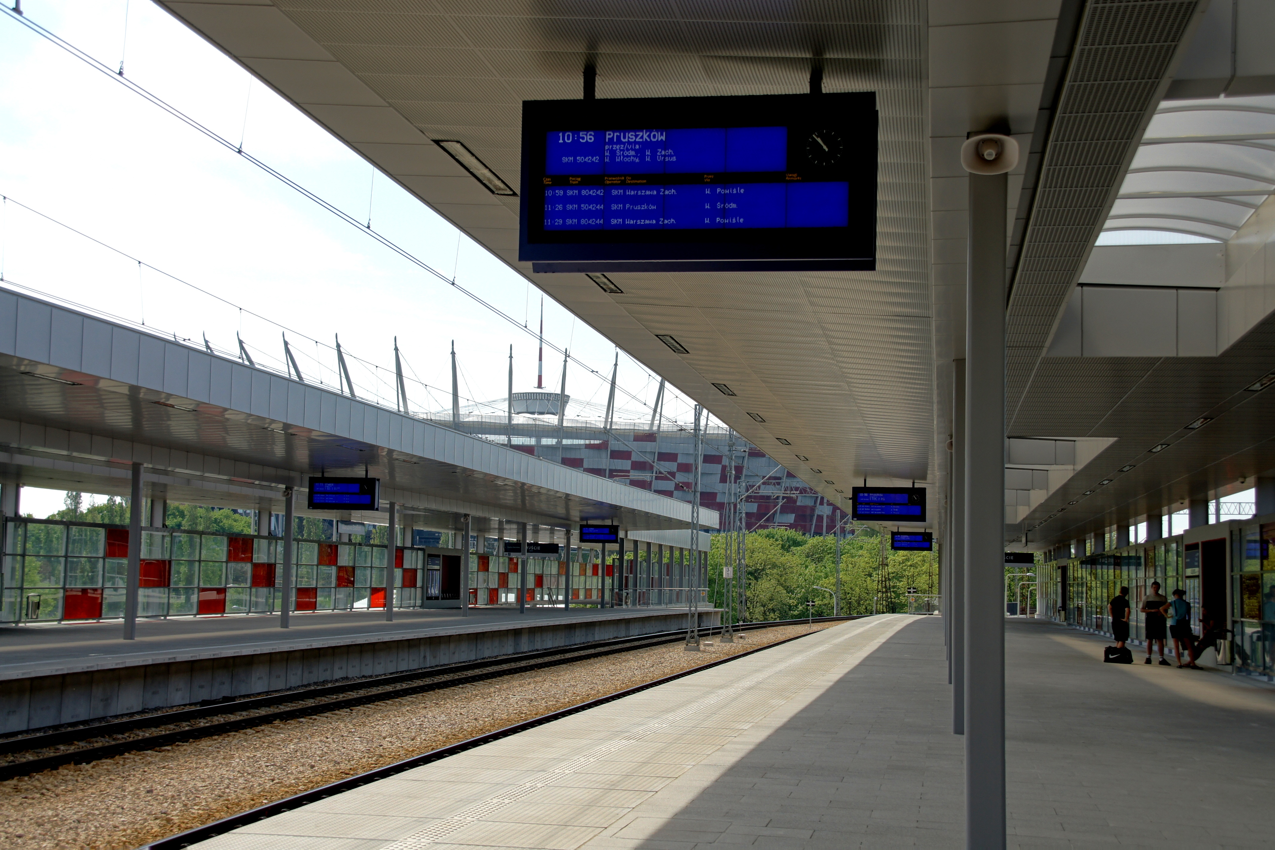 Stacja Warszawa Stadion - 05.05.2012 - dzień otwarcia po remoncie